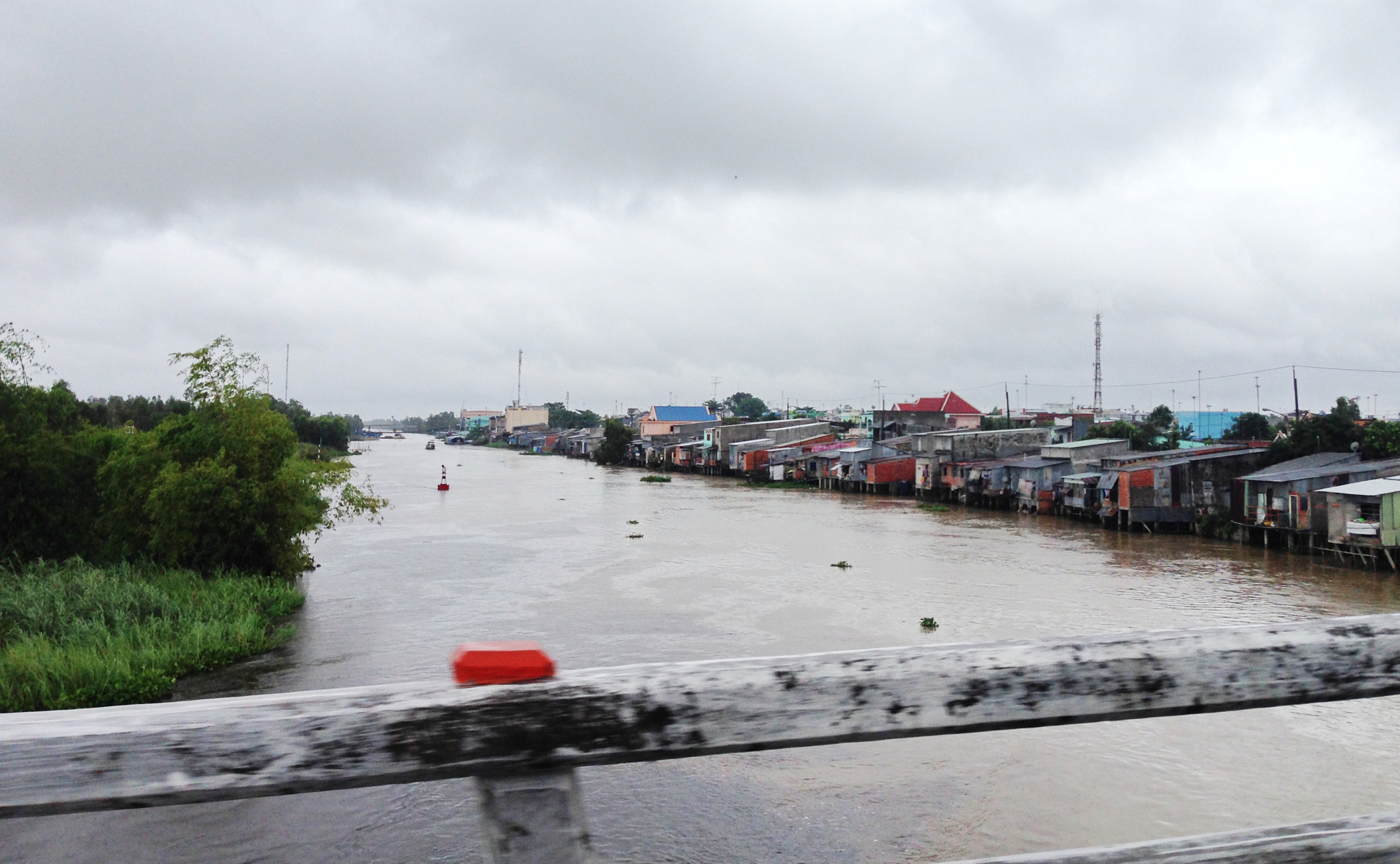 CầuTràm Chim, tam Nông đồng tháp, vietnam